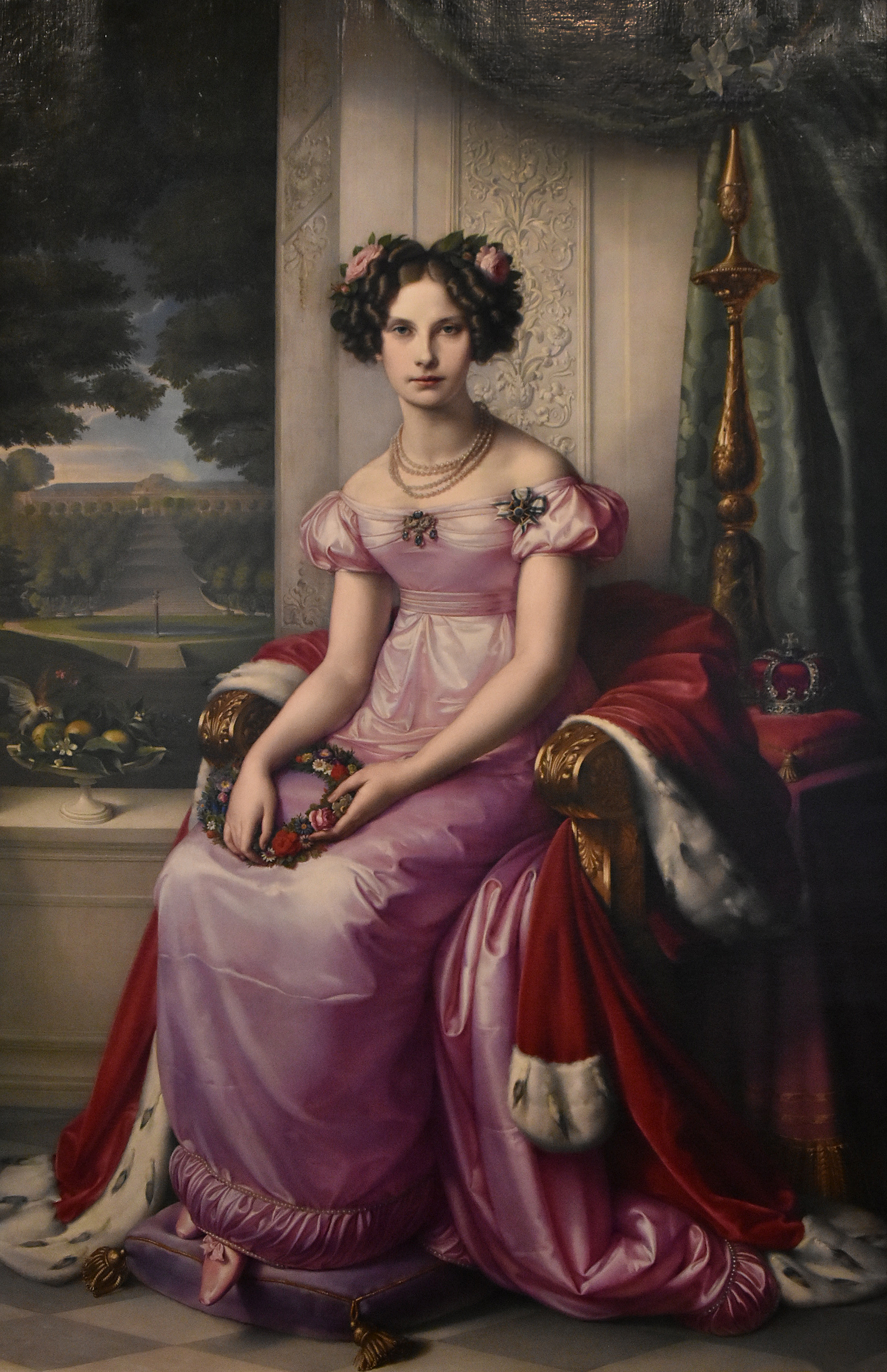 Karl Wilhelm Wach (1787-1845) Louise van Pruisen (1808-1870) Nieuw paviljoen Slot Charlottenburg 25-10-2018